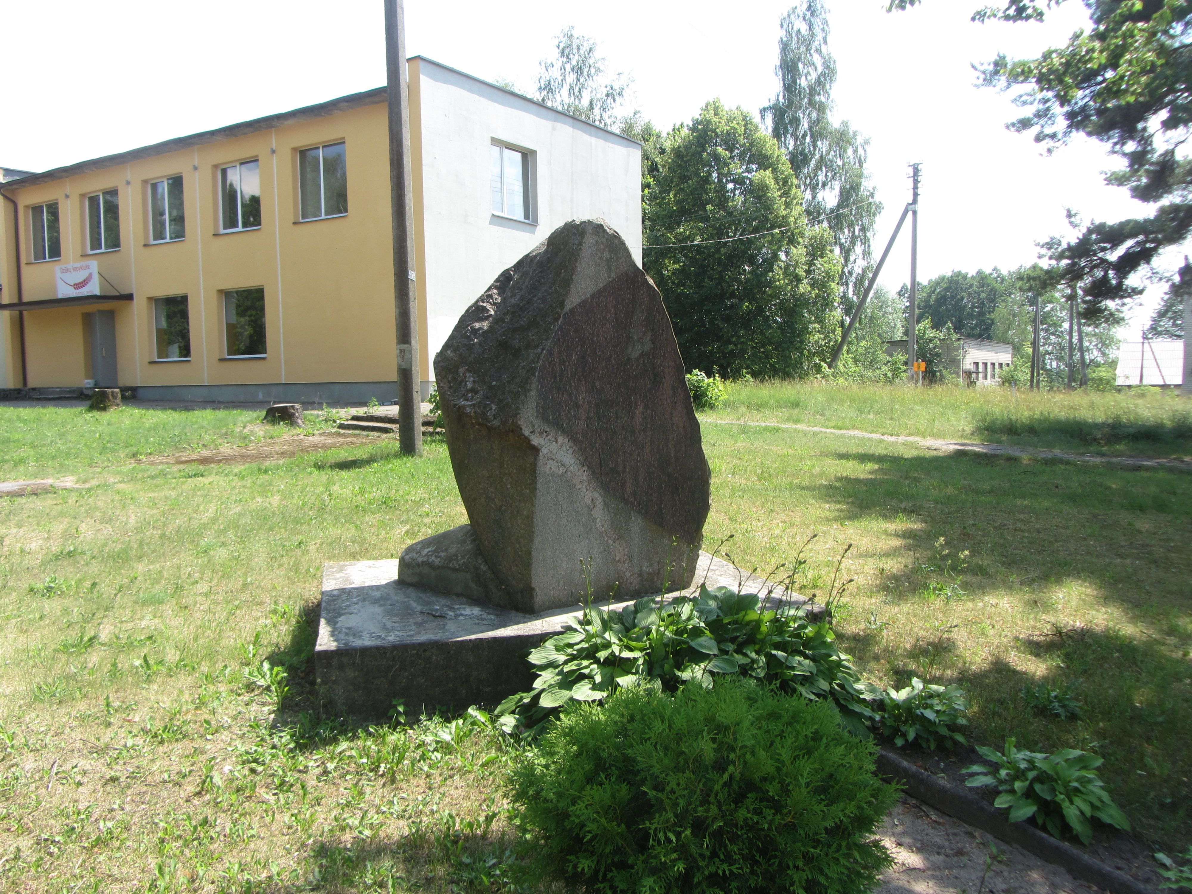 Verstaminai 67412, Lithuania